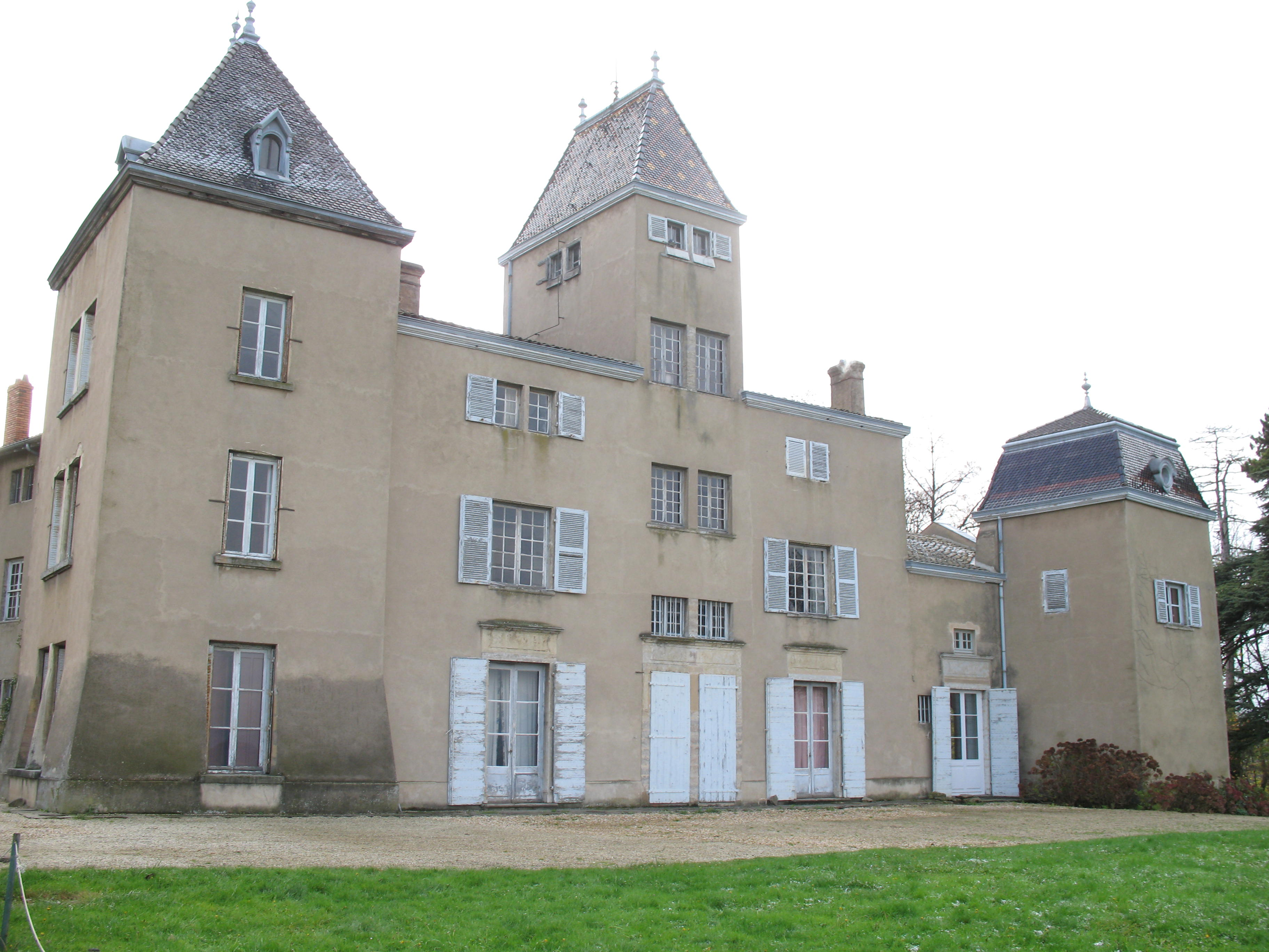 Château de Machy (Chasselay - Rhône)